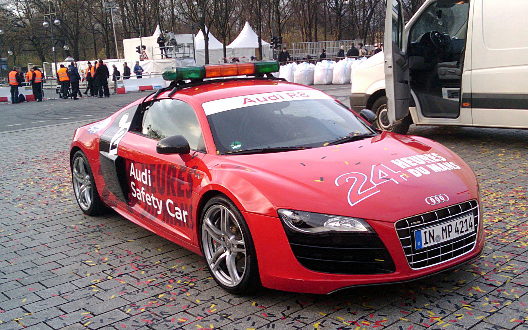 Audi R8 V10 safety car of the 24h du Mans at Platz des 18. März after "Sebastian Vettels Ehrenrunde in Berlin".